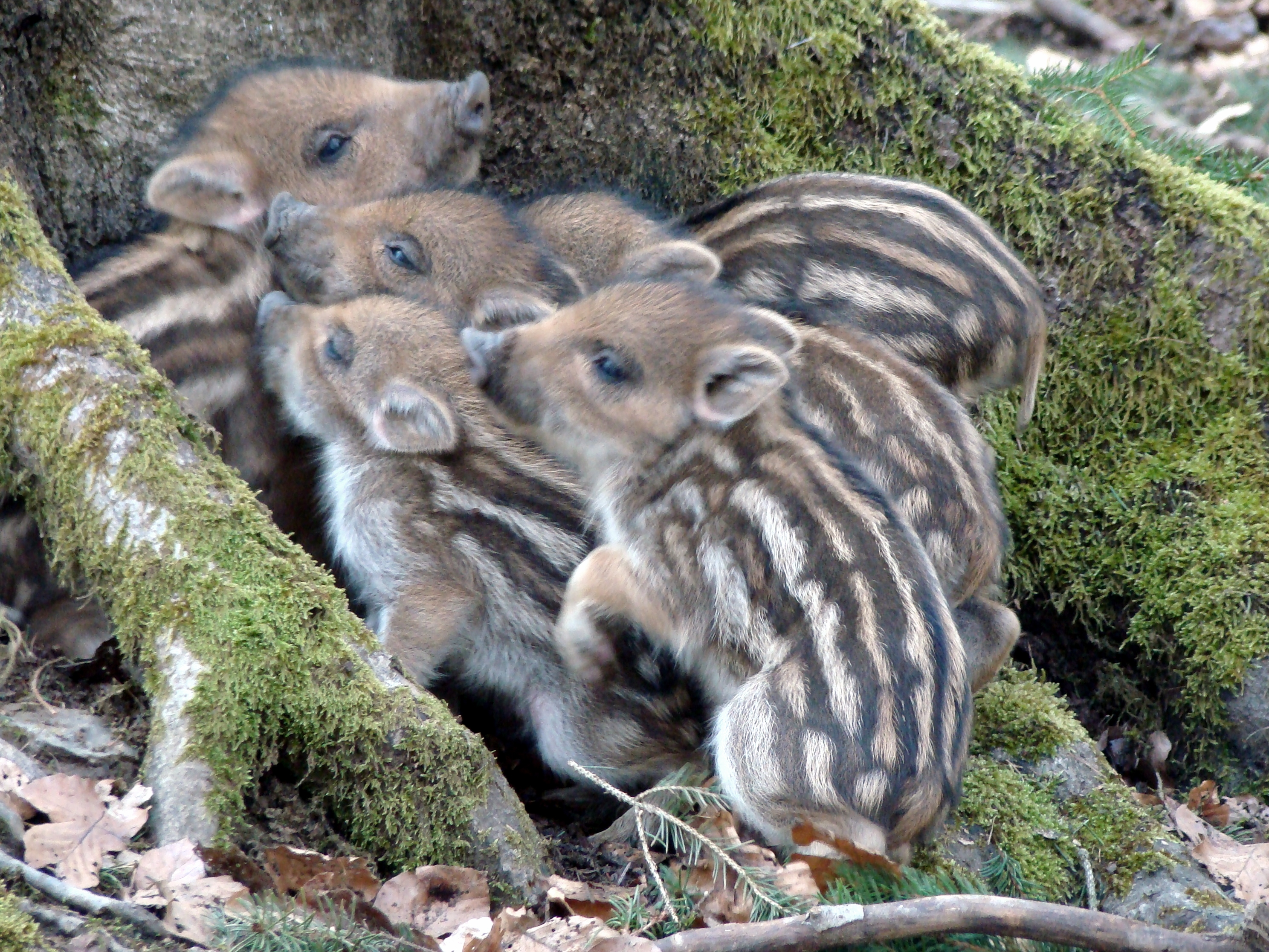 Frischlinge (Sus scrofa) kauern an einem Baumstubben, Eifel (Germany)